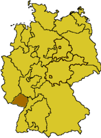 Karte der Evangelische Kirche der Pfalz (Protestantische Landeskirche)